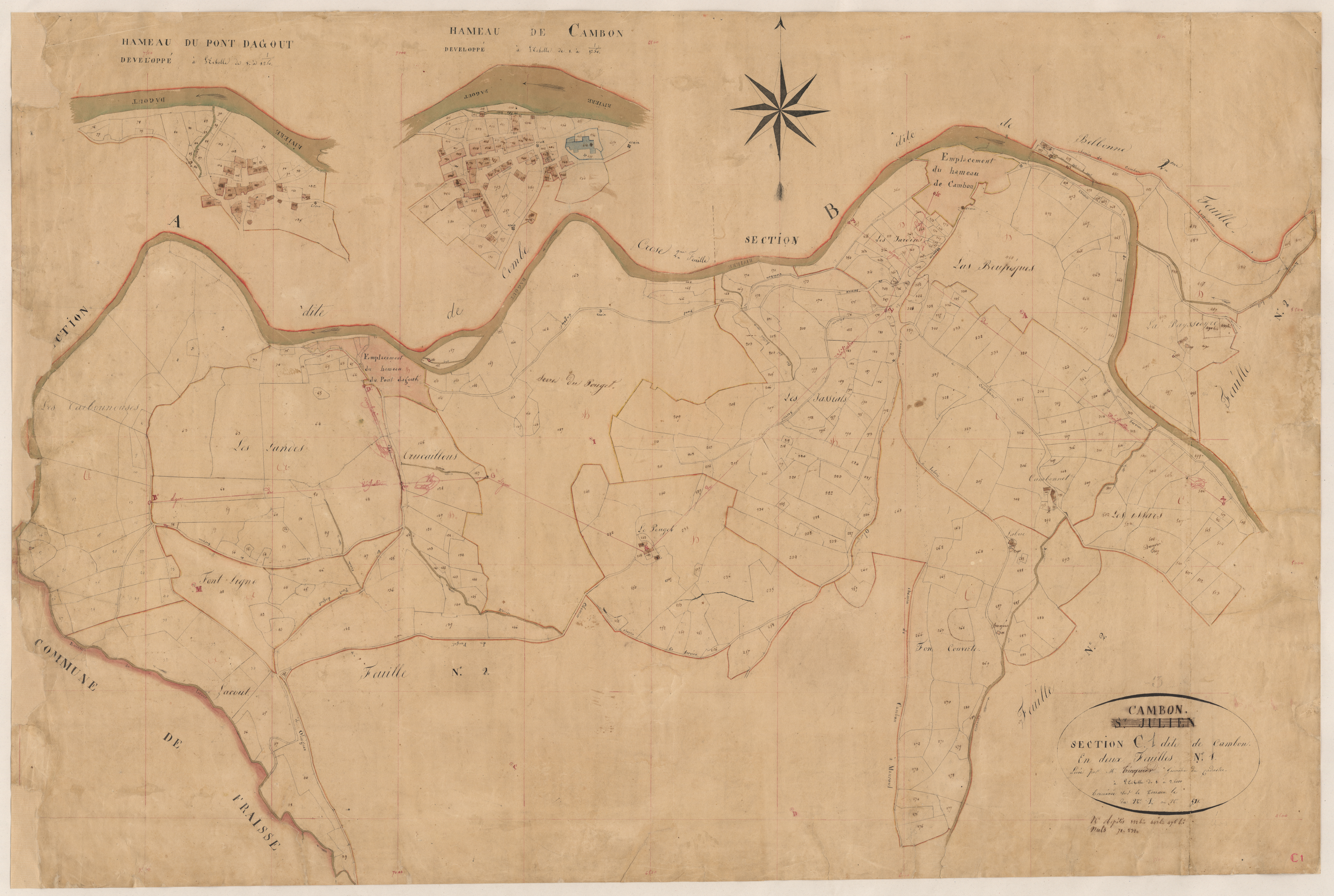 Cambon. - Cadastre napoléonien : section C1 de Cambon.